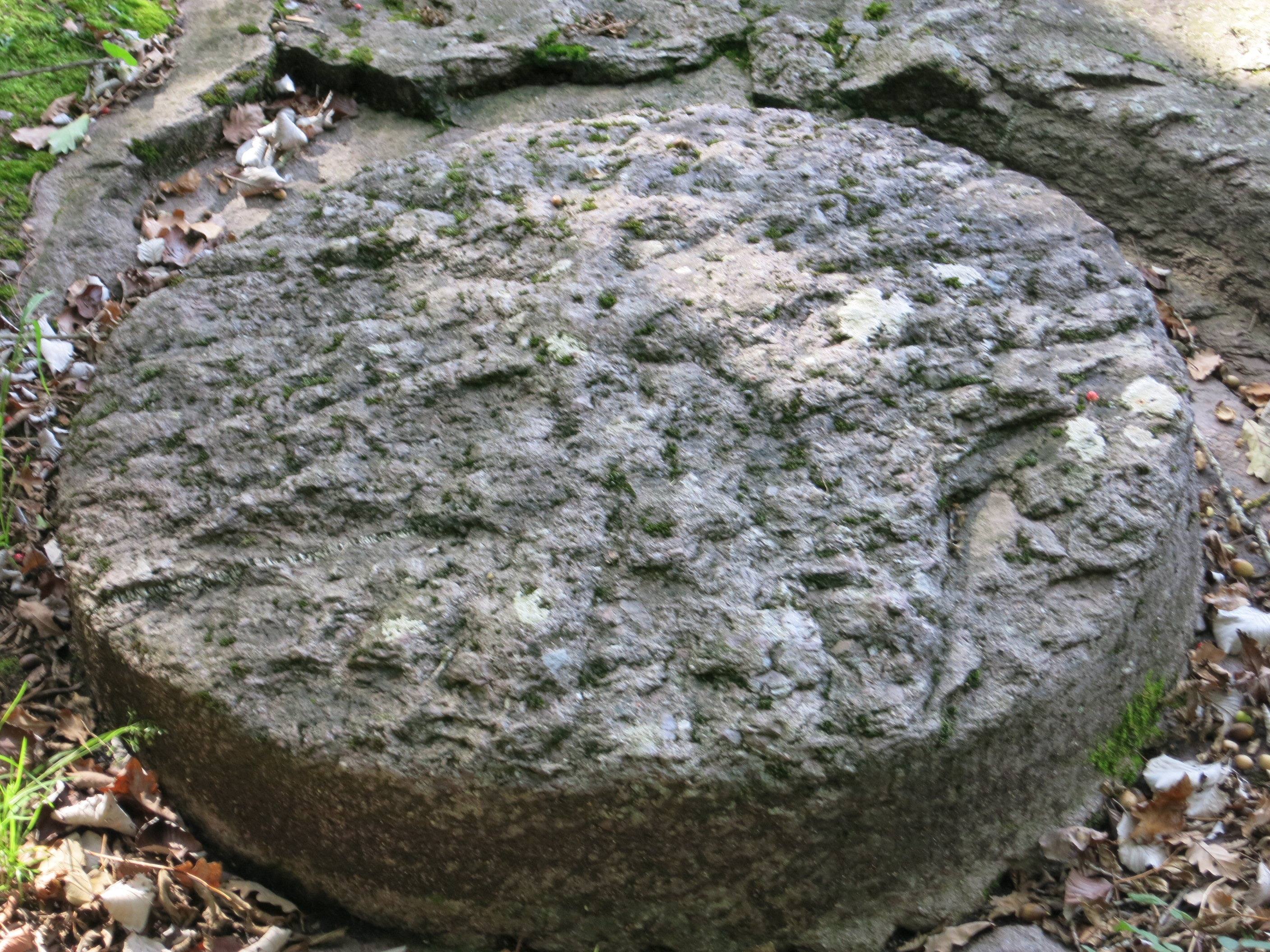 Mühlsteinbruch Castels, Mels SG, Schweiz